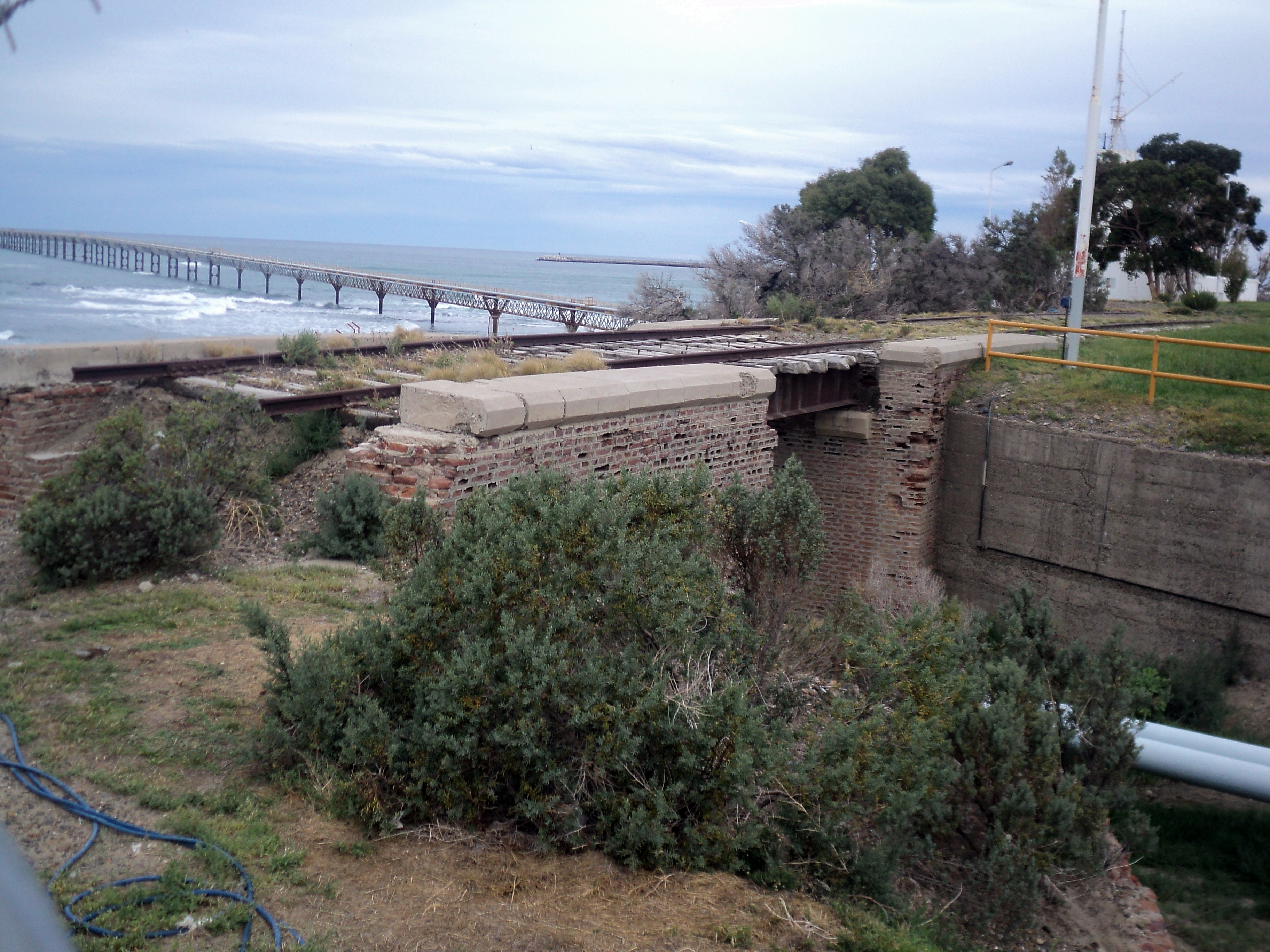 Restos del puente ferroviario que pasaba por el costado del muelle